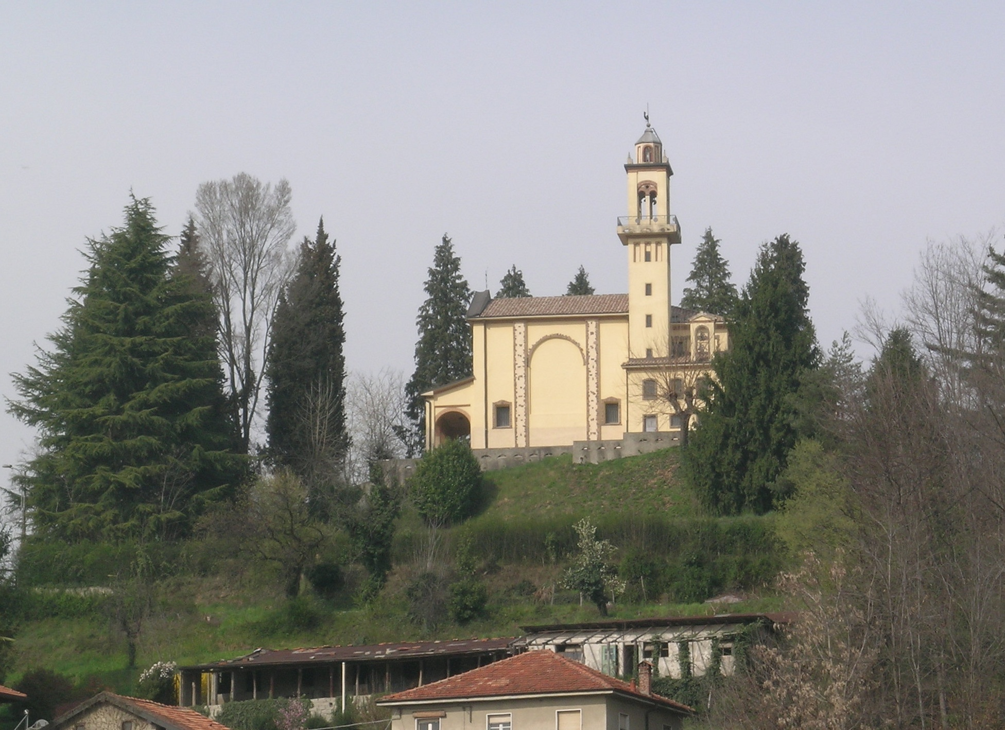 Vista laterale del santuario, opera propria.